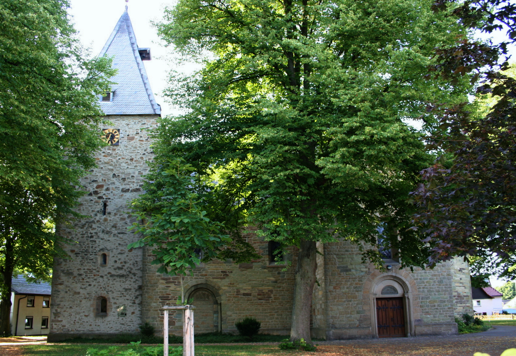 Evangelische Johanneskirche in Iserlohn-Hennen. Kreuzförmige romanische Saalkirche aus Bruchstein, errichtet um 1200.